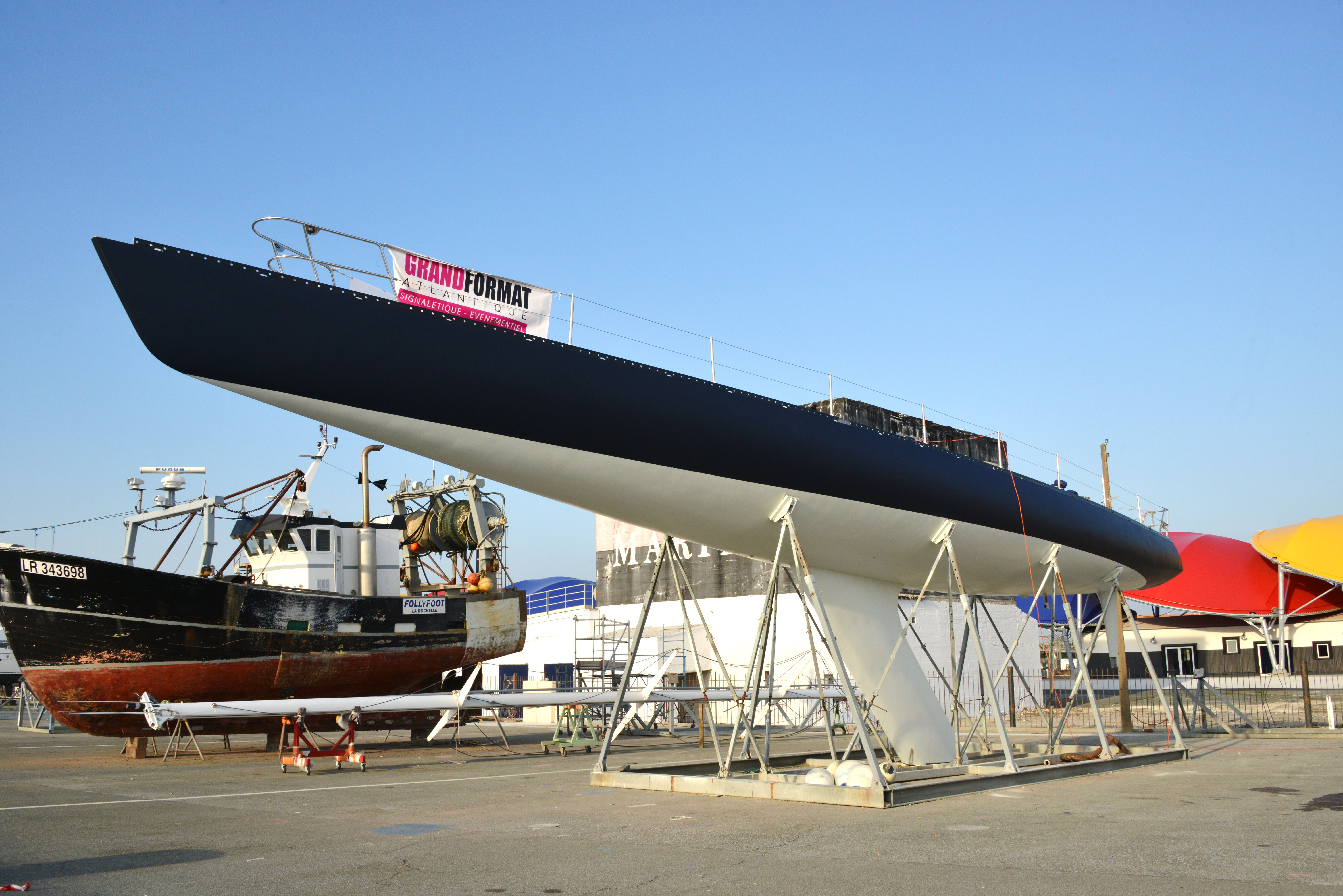 Sur le plateau nautique de la Ville en Bois, le voilier de compétition « Kriter VIII » (« K.VIII ») sur ber pour une remise en état en septembre 2014. La Rochelle, Charente-Maritime, France.